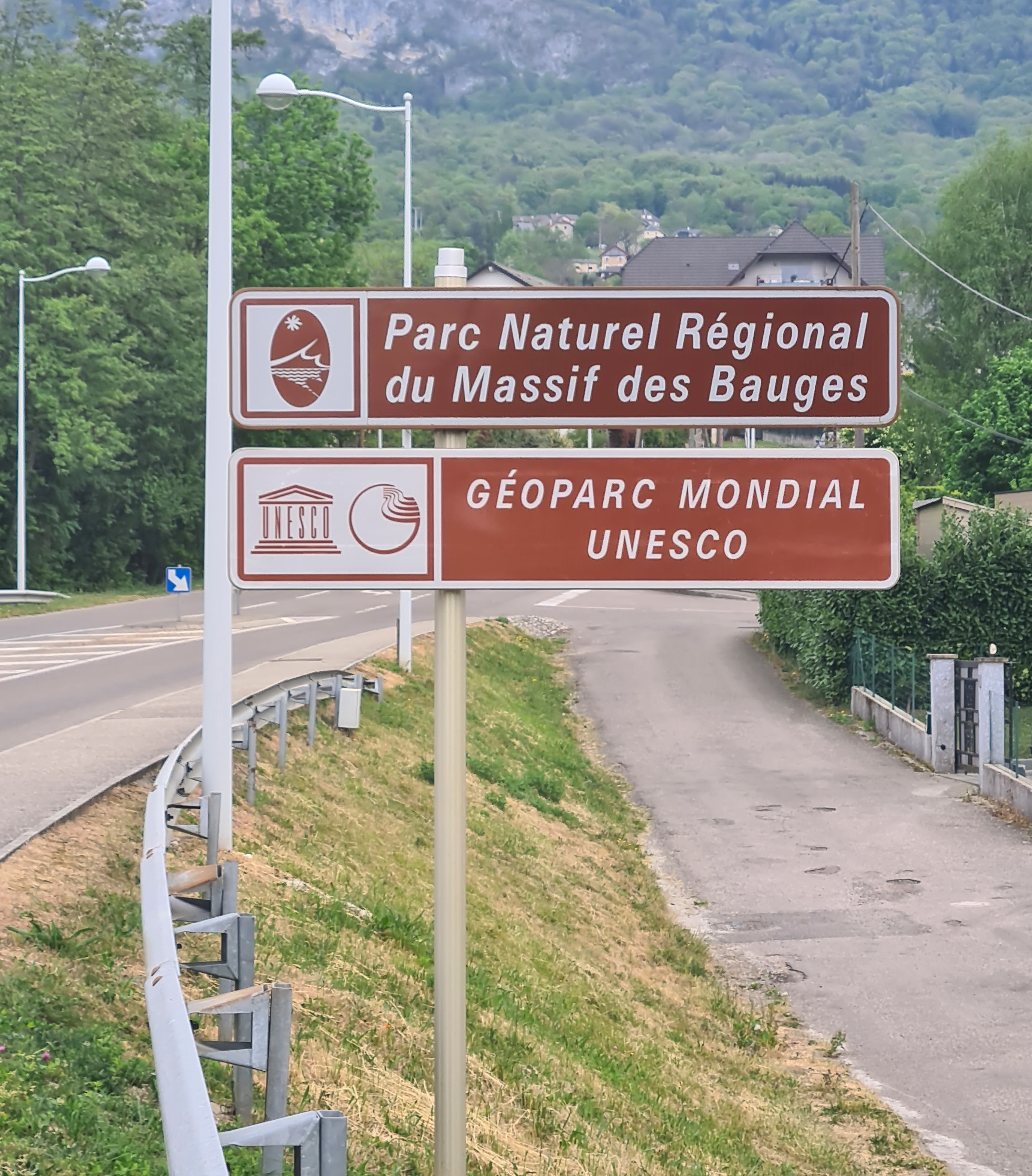 Panneaux de type E33 du parc naturel régional du massif des Bauges et Géoparc mondial Unesco. Implantés en 2020 sur la D913 à l'entrée de Mouxy (Savoie).